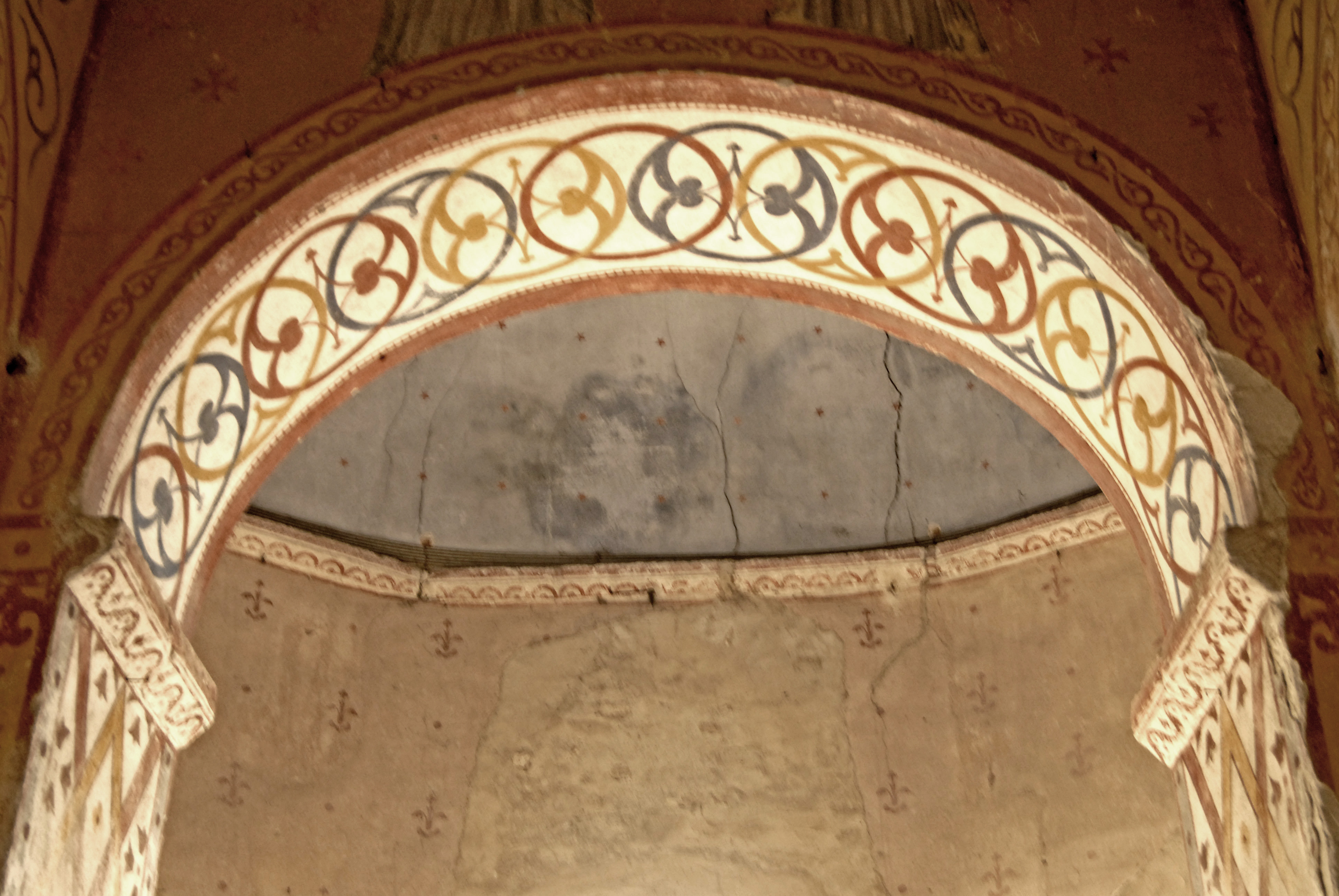 Civaux, Kirche, Chor aus "Vierung"